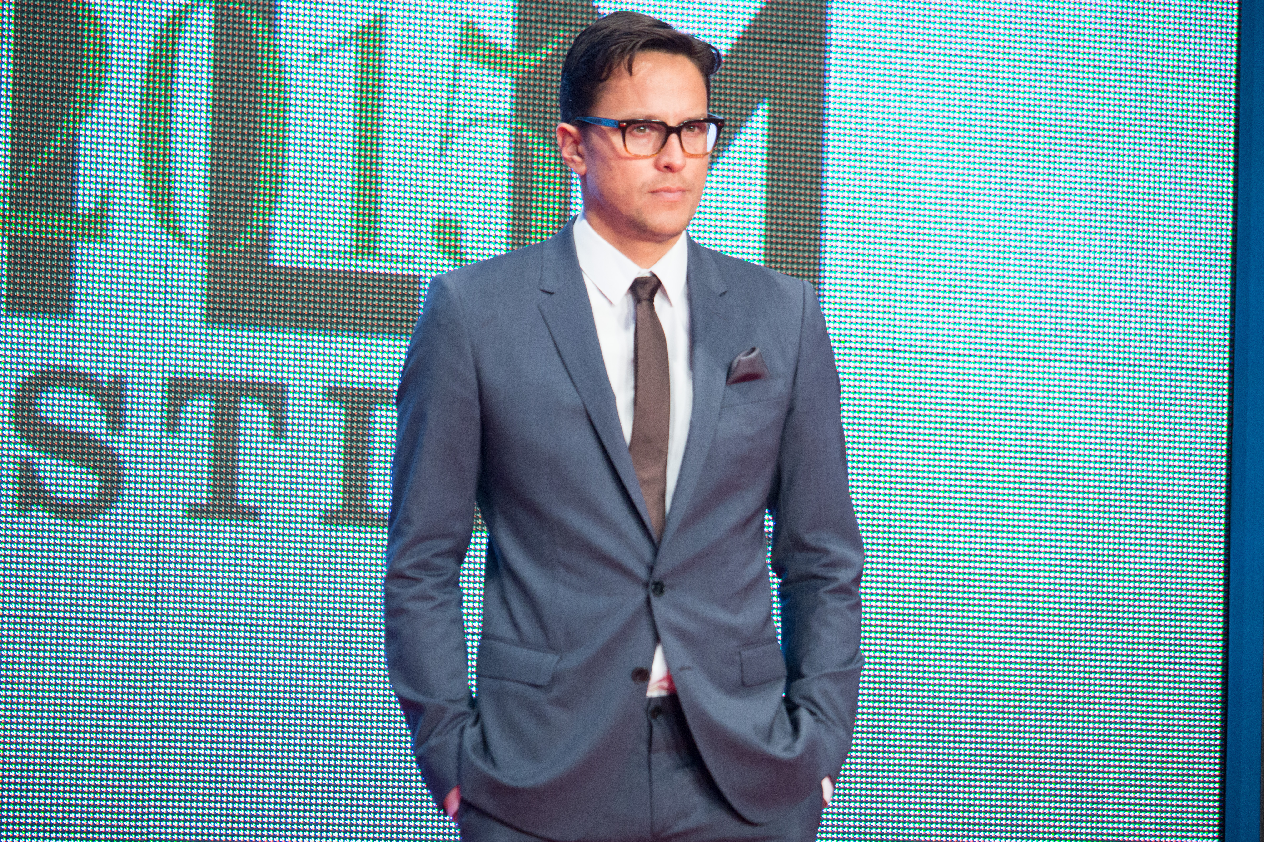 第28回 東京国際映画祭 オープニングセレモニー キャリー・ジョージ・フクナガ (ビースト・オブ・ノー・ネーション)